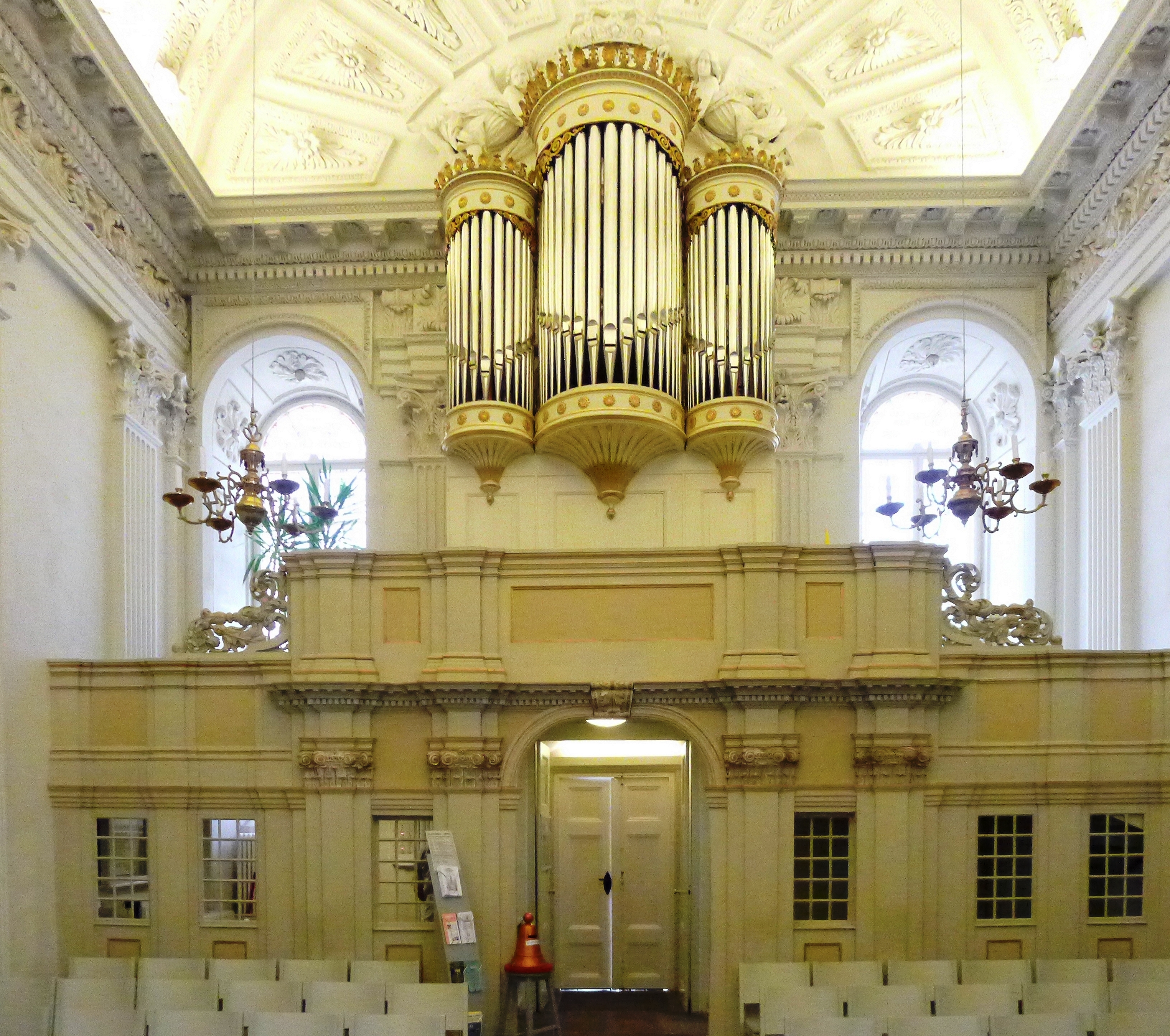 Orgelempore der Schlosskirche fotografiert vom Altar